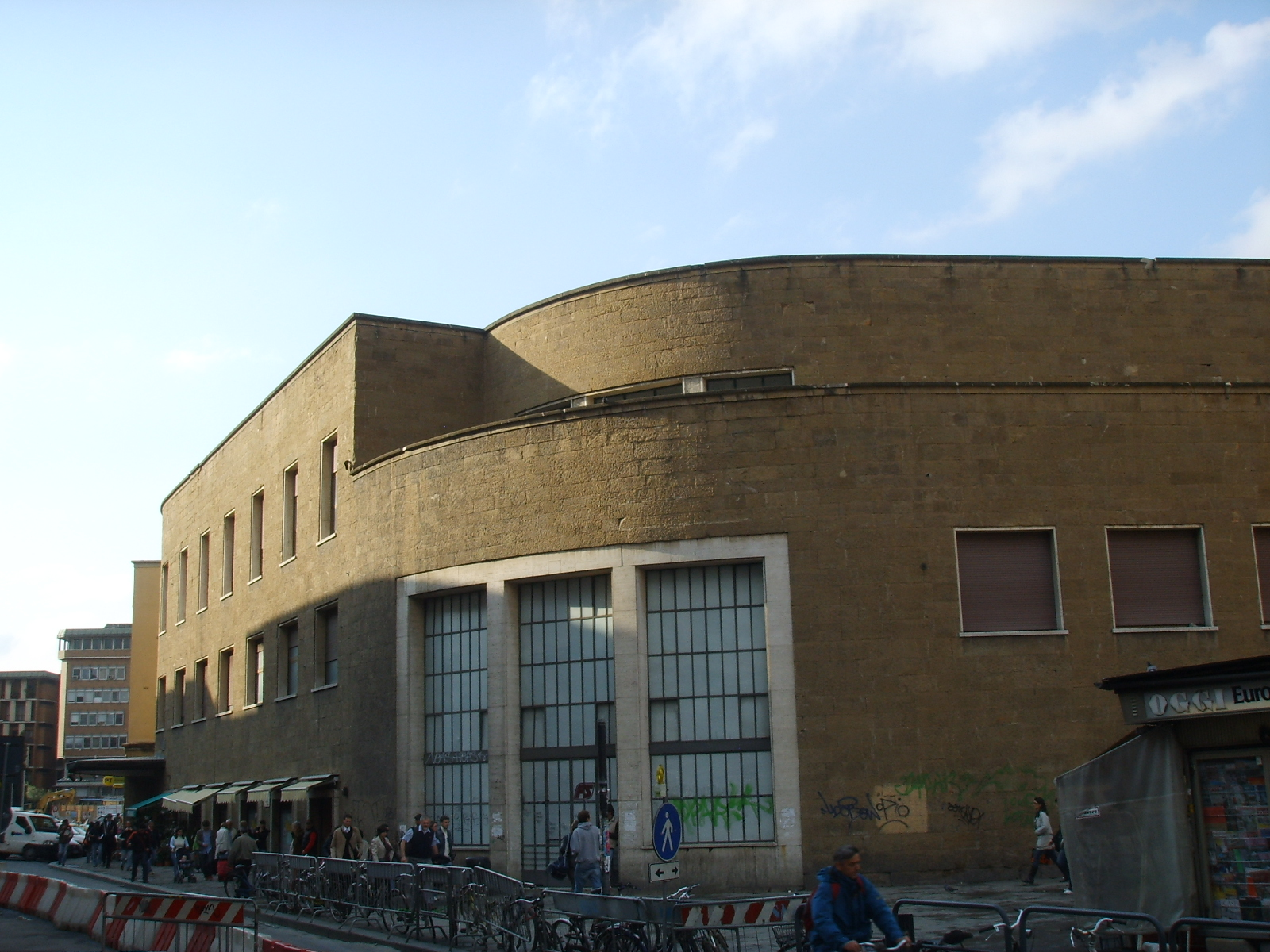 Stazione smn lato